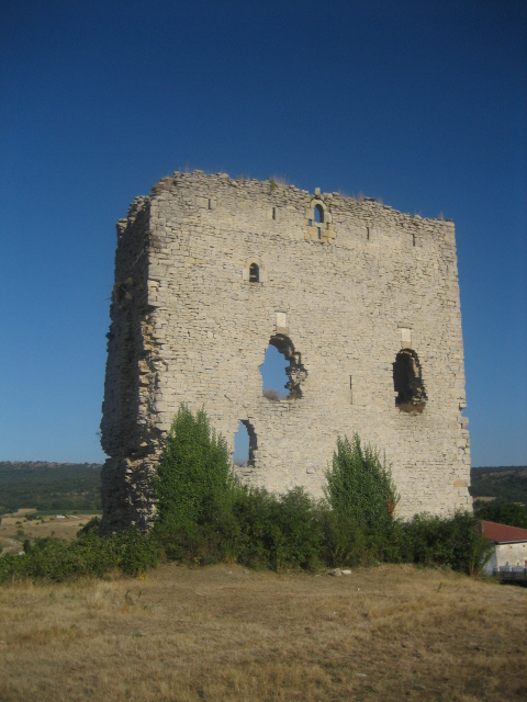 Imagen de La Torre de Castrobarto